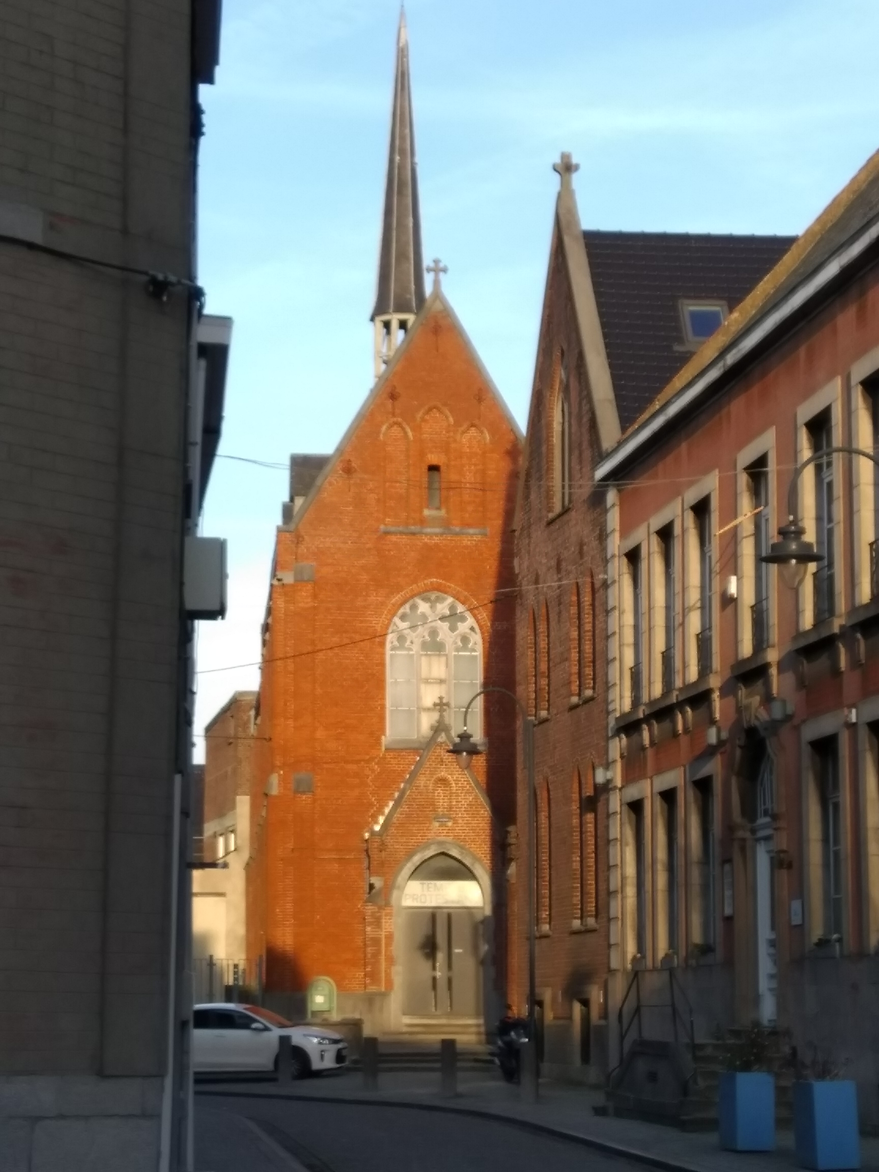 Id est templum protestans in Via Scriniariorum (rue des Écriniers) Athi.